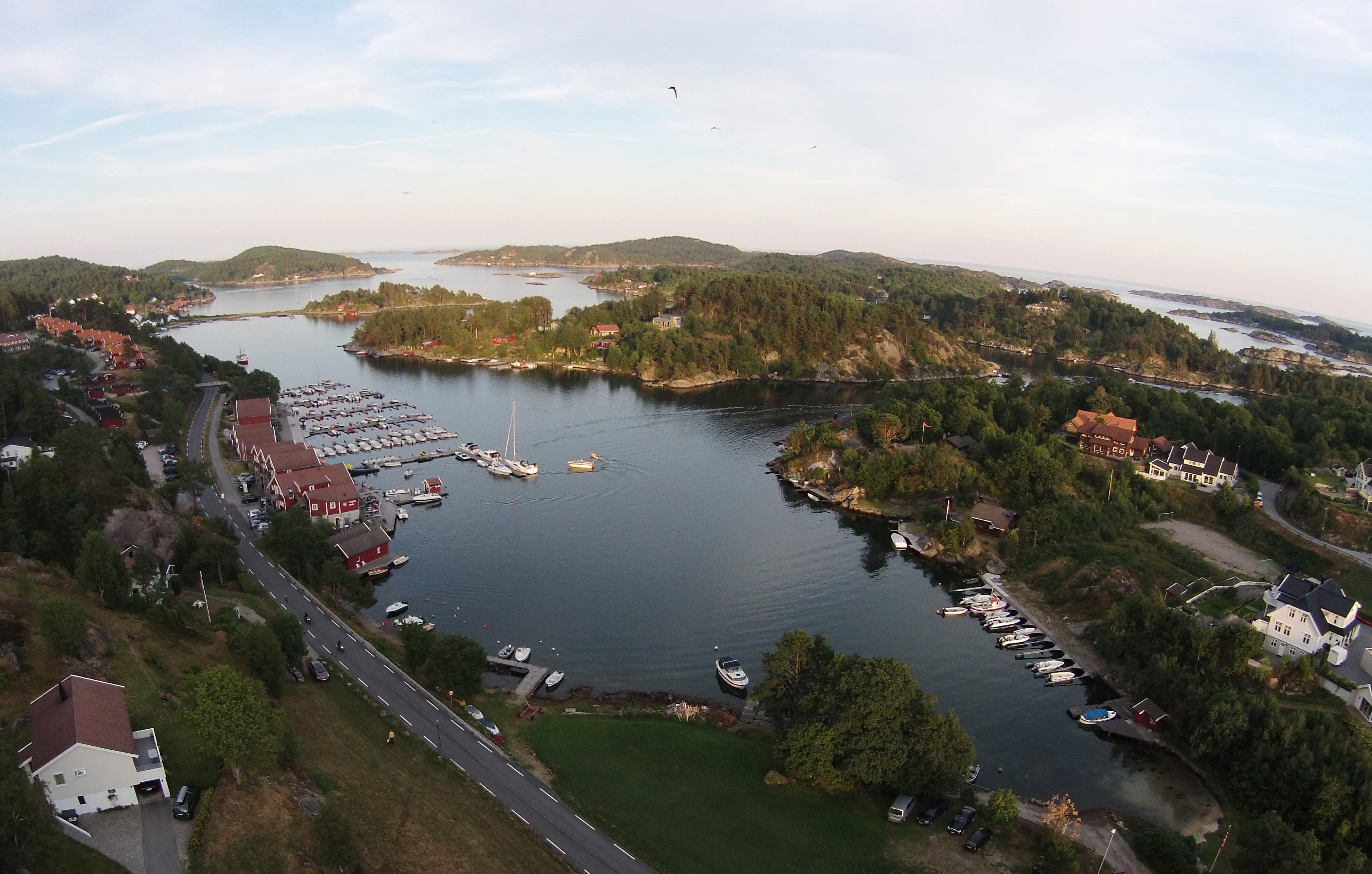 En gjest gav oss disse bildene i 2014.